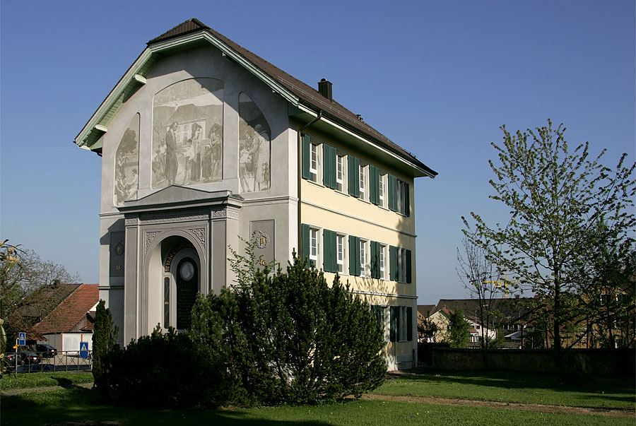 Altes Schulhaus von Birr mit Pestalozzi-Denkmal